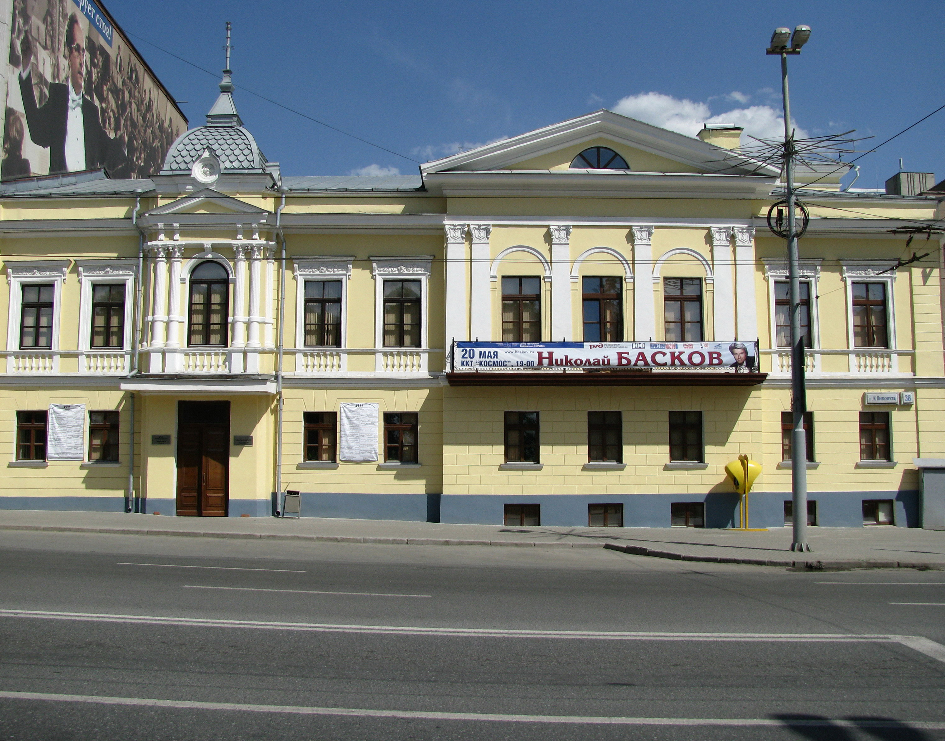 Учебный театр Екатеринбургского государственного театрального института.